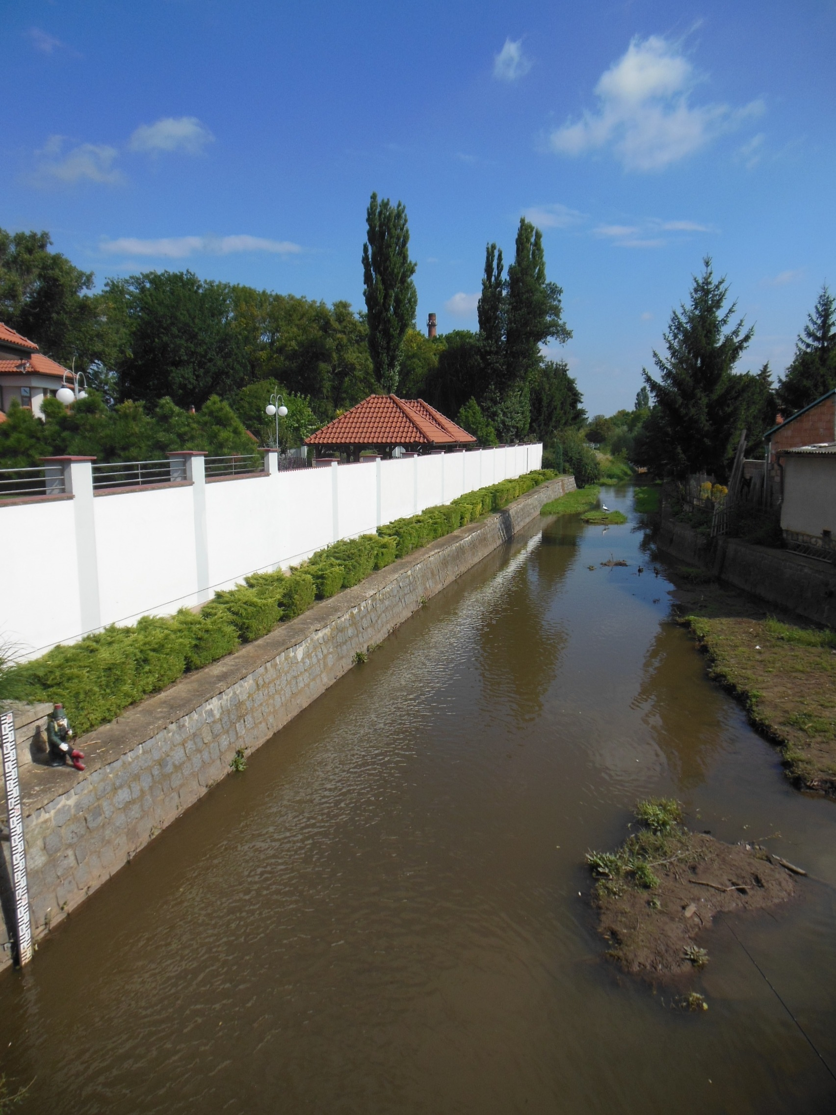 Bakovský potok v úseku ulice Za Roudnickou branou ve Velvarech (okres Kladno).